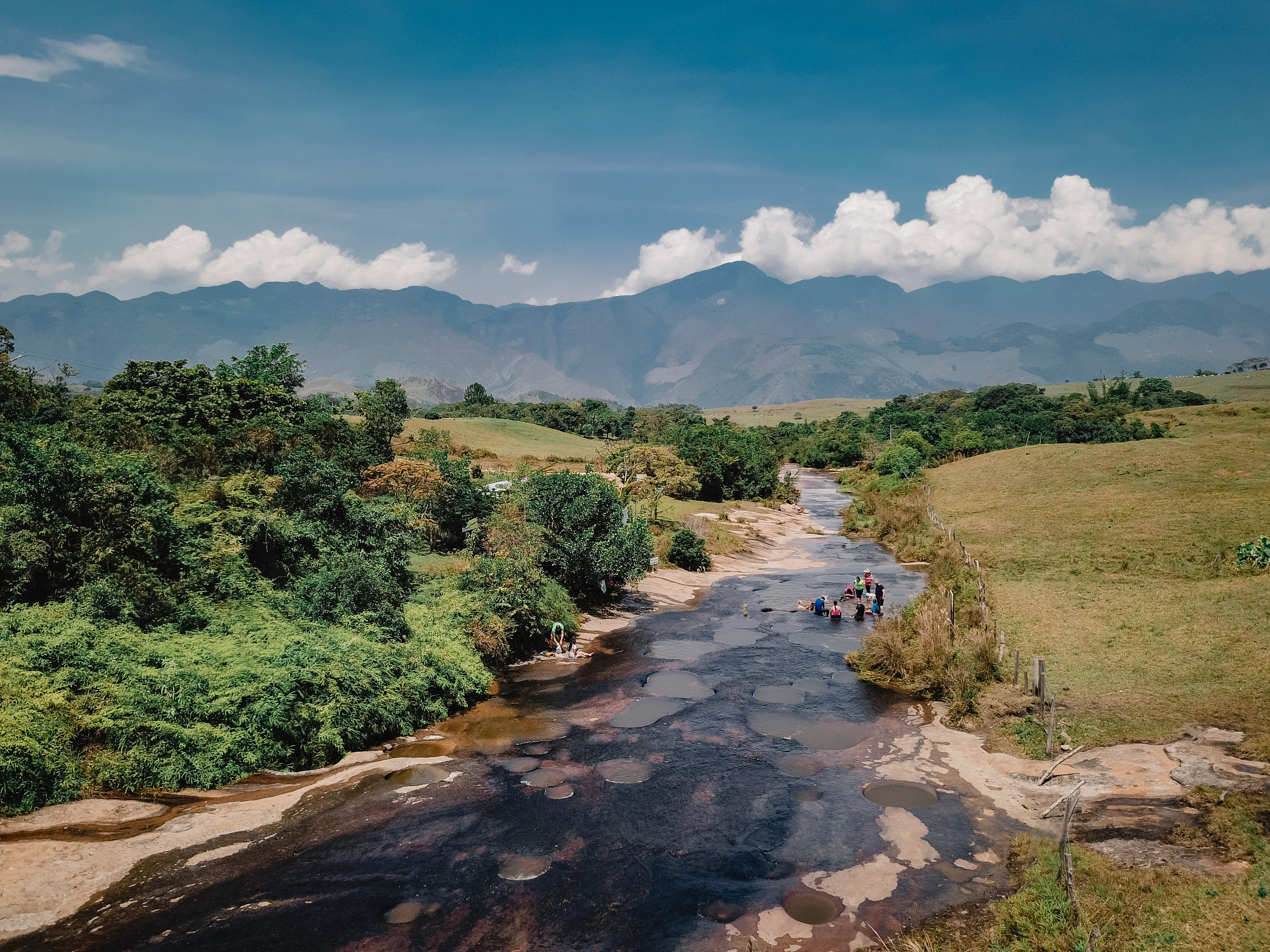 Quebrada Las Gachas, Guadalupe (Santander)